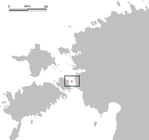 Kesselaid